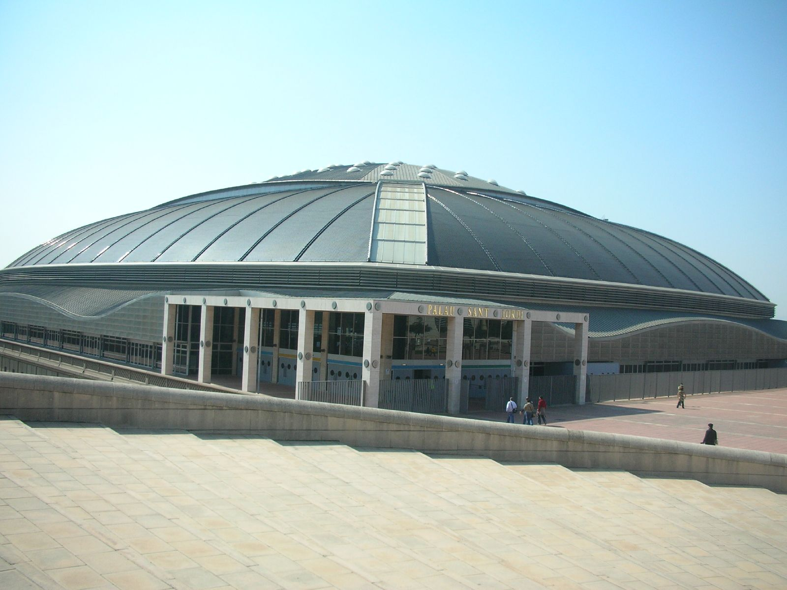 Palau Sant Jordi, Montjuïc, Barcelona, Catalunya.